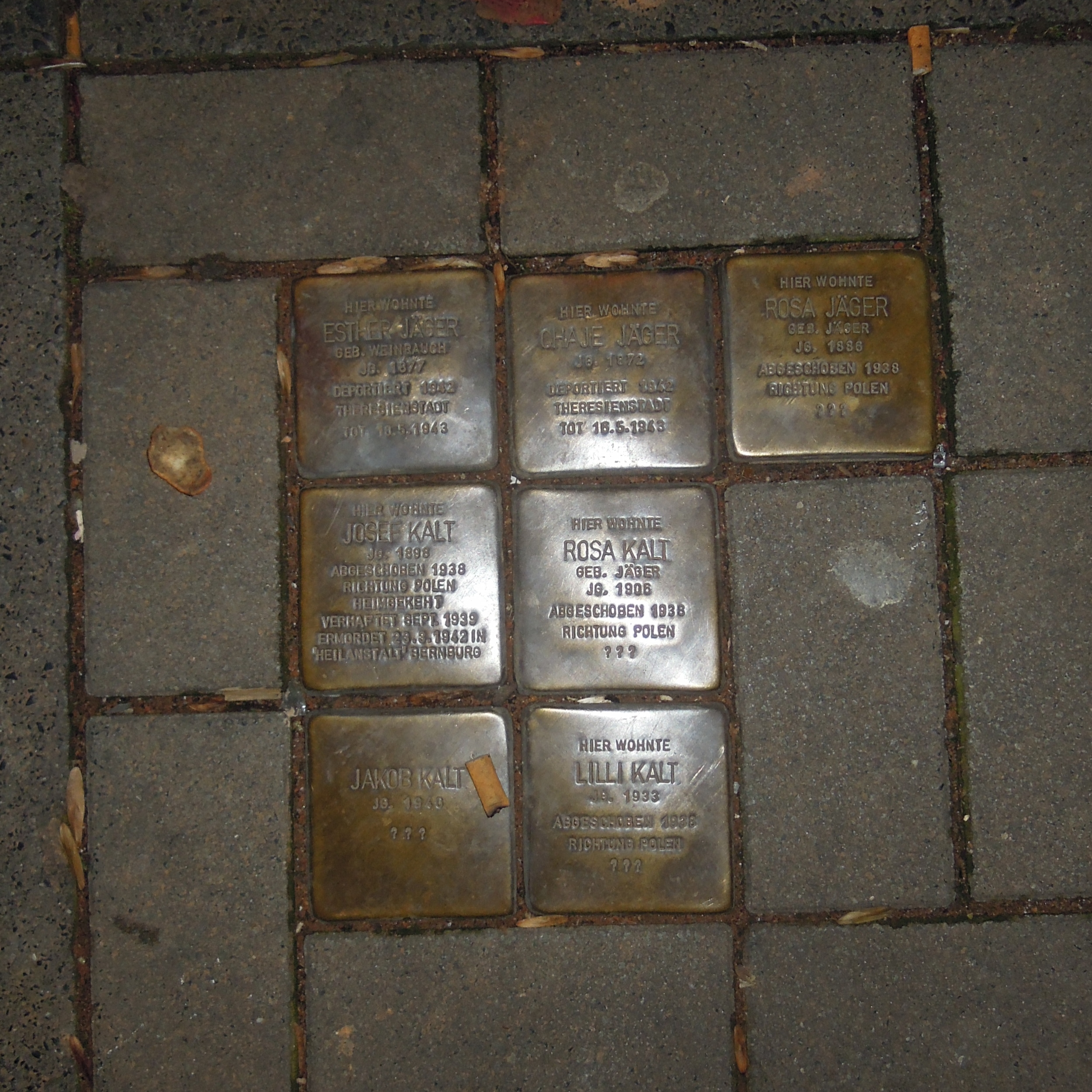 Stolpersteine Dortmund Burgholzstraße 40